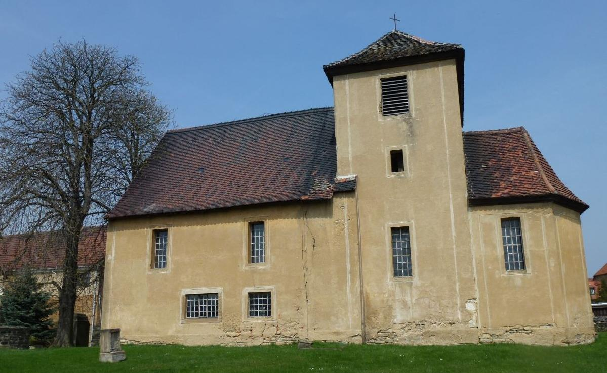 Kirche in Weißenborn